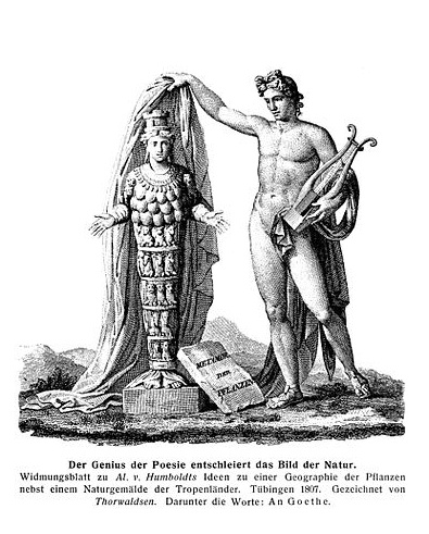 Apollon dévoilant une statue d'Artémis aux multiples seins